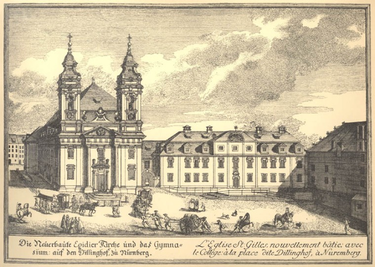 Kirche von St. Egidien und das Melanchthon-Gymnasium in Nürnberg. Kupferstich von Johann Adam Delsenbach (1687-1765). Bayerische Staatsbibliothek, Porträt- und Ansichtensammlung.